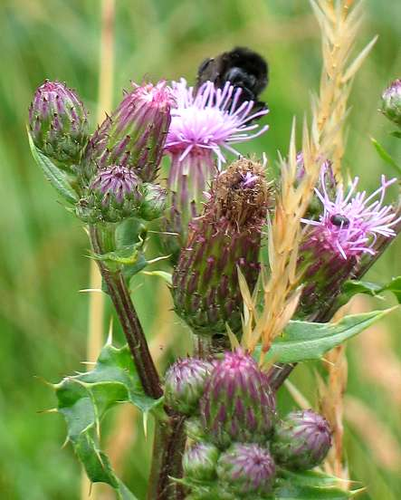 Blütenstand der Acker-Kratzdistel Fotografiert von Mussklprozz am 20. Juni 2004